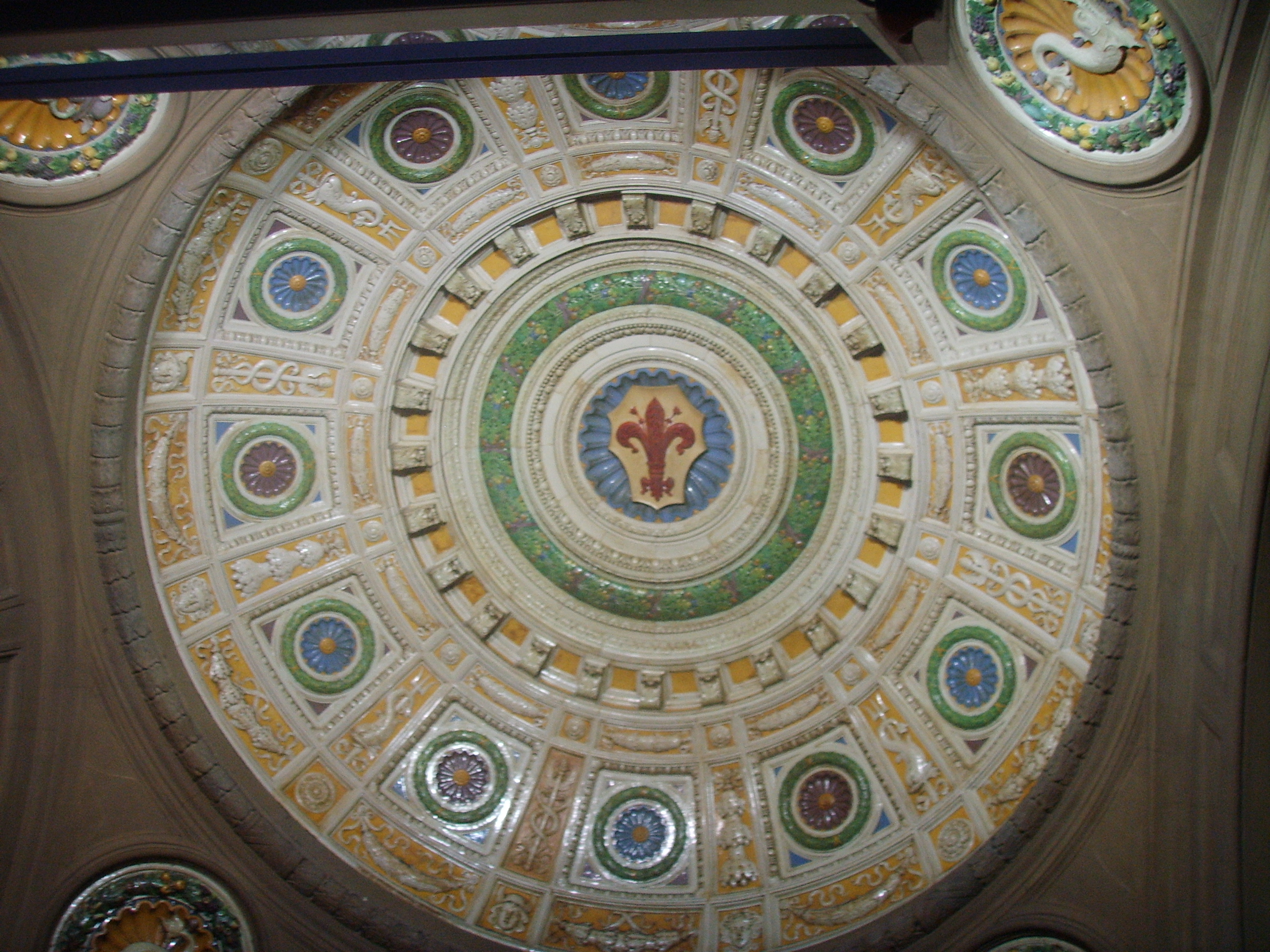 Poste centrali, Firenze. in Florence, italy